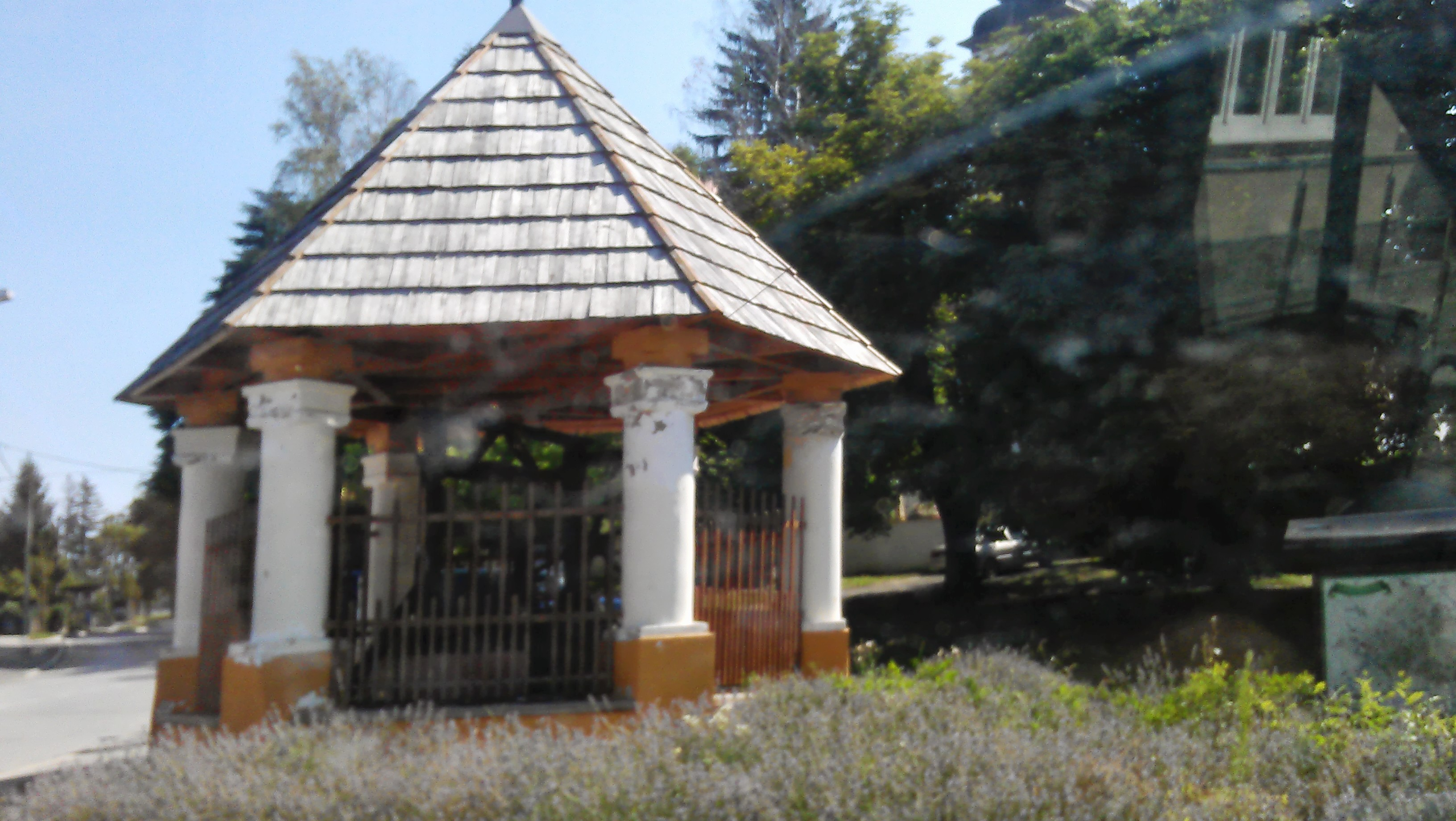 Kloštar Ivanić